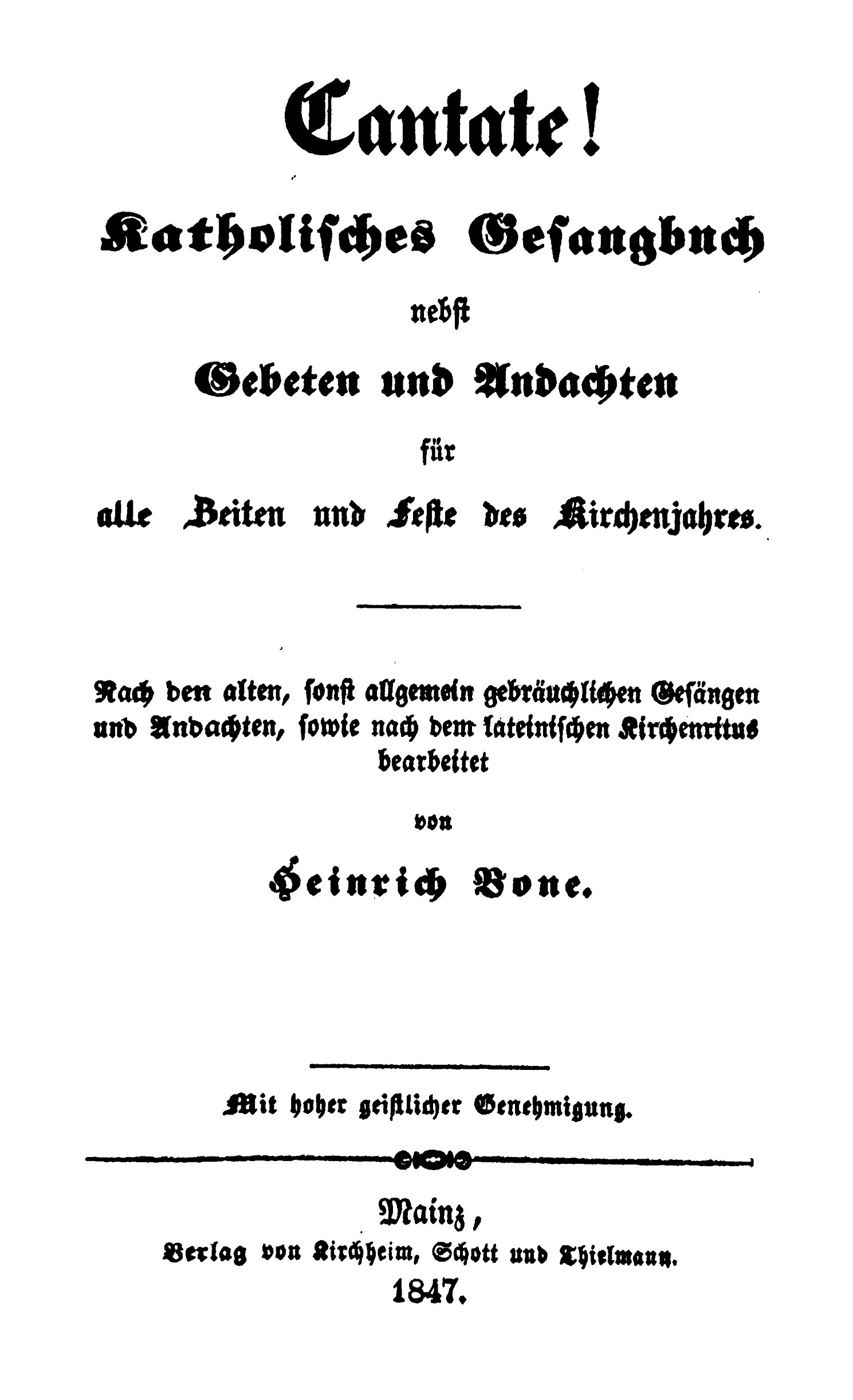 Heinrich Bone: Cantate, Mainz 1847, Titelblatt